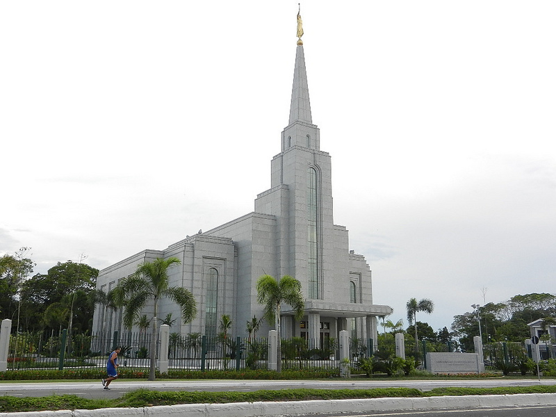 foto do templo mórmon